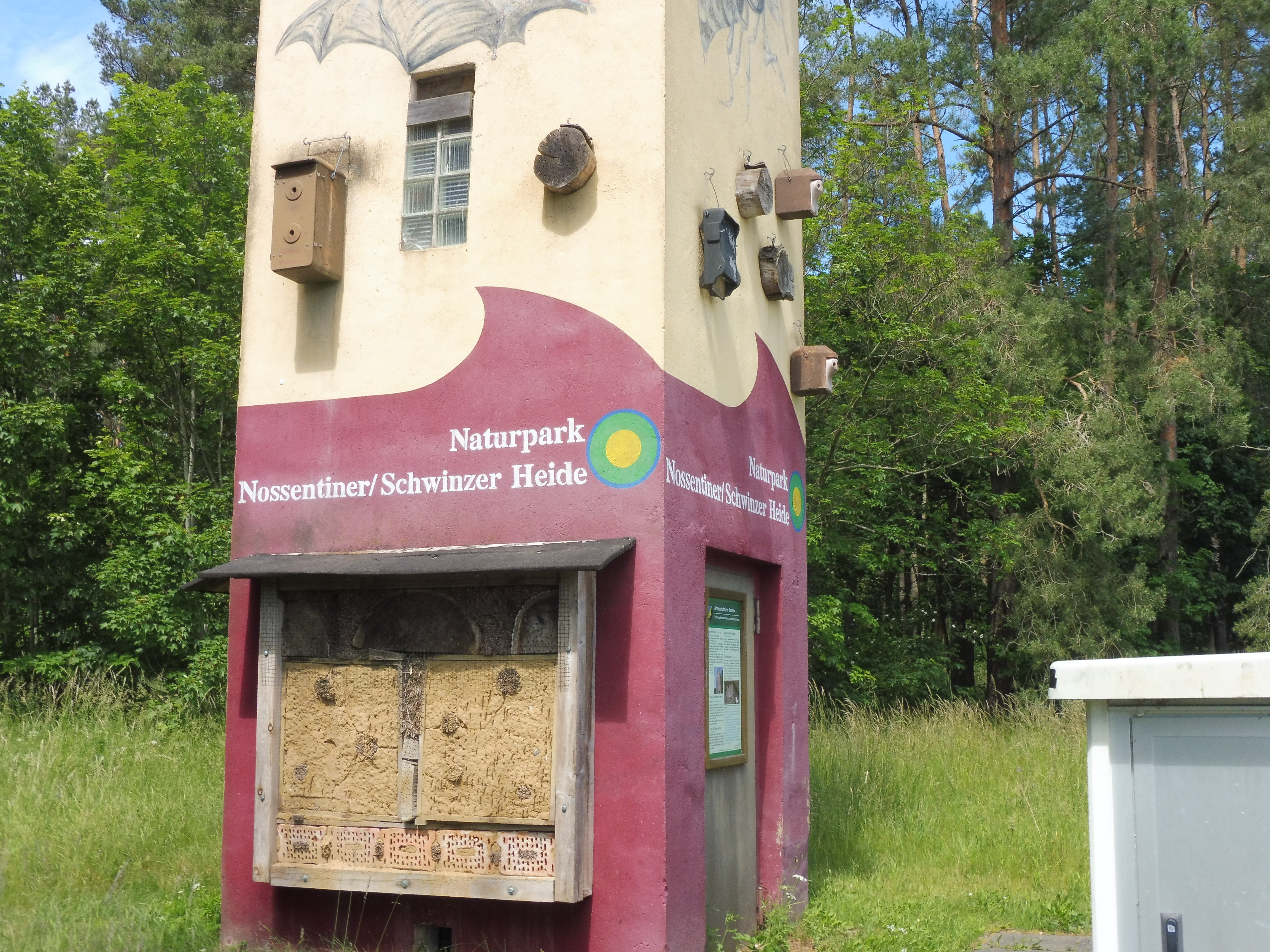 Alte und neue Transformatorenstation in Bossow